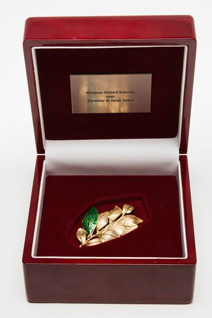 W 2018 Muzeum Historii Katowic zostało uhonorowane Złotym Laurem Umiejętności i Kompetencji za 2017 rok (w kategorii „Media”) /fot. A. Kuś/